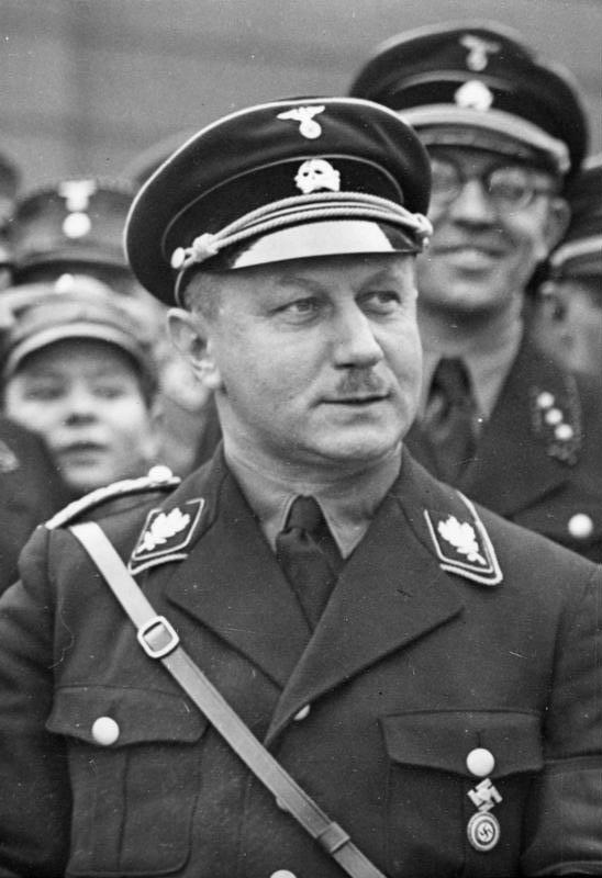 Die feierliche Amtseinführung des neuen Potsdamer Oberbürgermeisters, Generalmajor Friedrichs, durch den preußischen Ministerpräsidenten General Hermann Göring, welchem gleichzeitig die Ehrenbürgerschaft der Stadt Potsdam verliehen wurde am 10. März 1934. Der preußische Ministerpräsident General Hermann Göring, mit dem neuen Potsdamer Oberbürgermeister Generalmajor Friedrichs (rechts) und dem Oberpräsidenten der Provinz Brandenburg Kube (links) nach der feierlichen Amtseinführung. [Ausschnitt von Bild 102-15607]